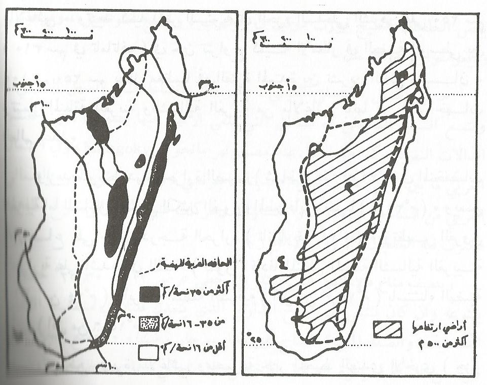 الاقاليم المناخية وتوزع الامطار